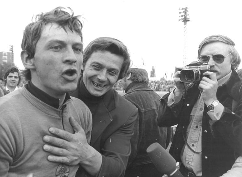 Bernd Drogan ADN-ZB Reiche 15.5.77 Cottbus: 30. Internationale Friedensfahrt Glücklicher Sieger der 8. Etappe Berlin-Cottbus (132 kilometer) am 15.5. wurde der Cottbuser Bernd Drogan (links). [Cottbus.- Bernd Drogan, mitte Heimtrainer Manfred Nitschke (SC Cottbus), rechts Fotograf mit Pentacon-Fotoapparat Praktica VLC] Abgebildete Personen: Drogan, Bernd: Radrennfahrer, Friedensfahrt Teilnehmer, DDR Nitschke, Manfred: Radsport Trainer, SC Cottbus, DDR